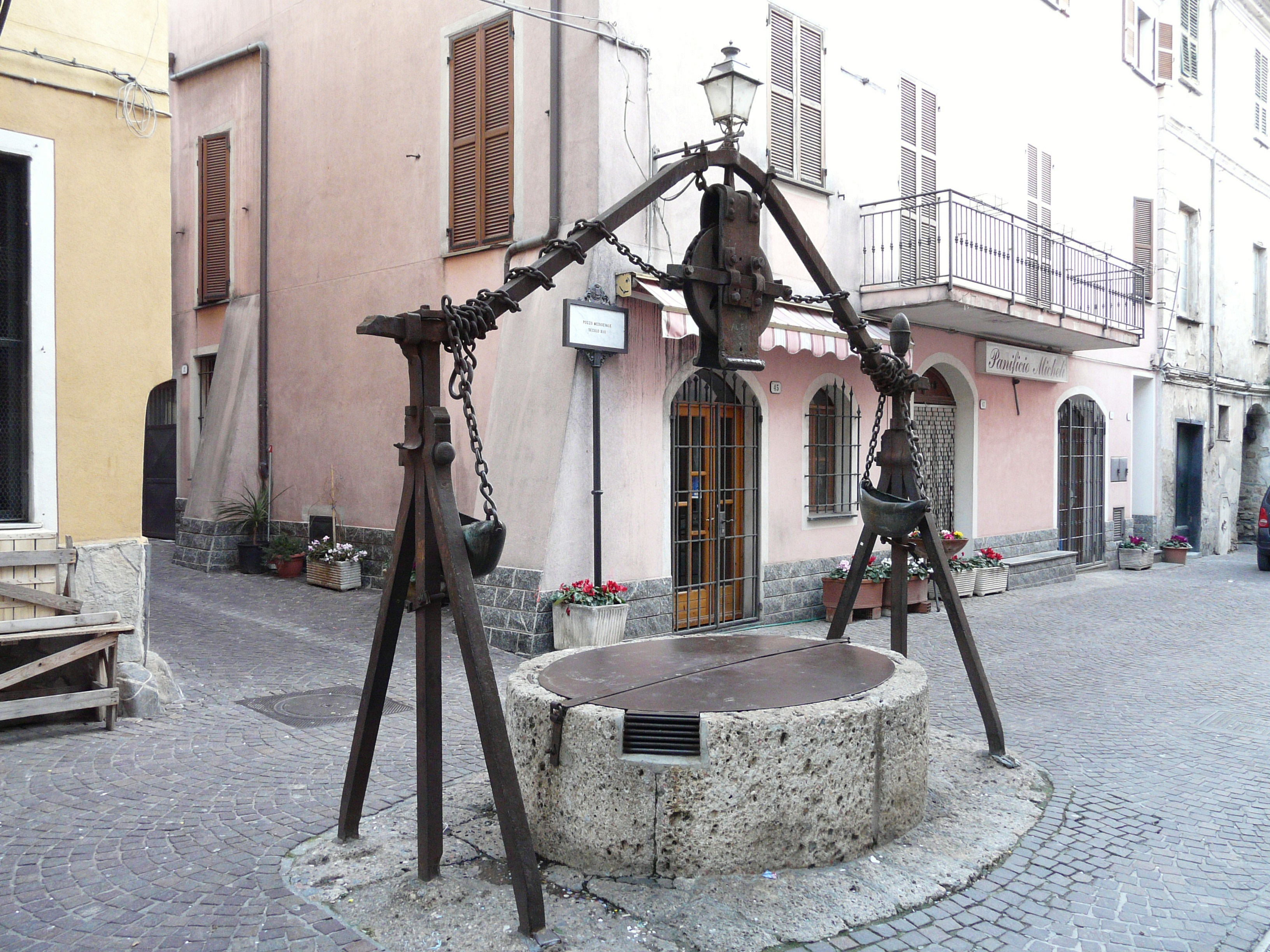 Il pozzo del centro storico di Villanova d'Albenga, Liguria, Italia